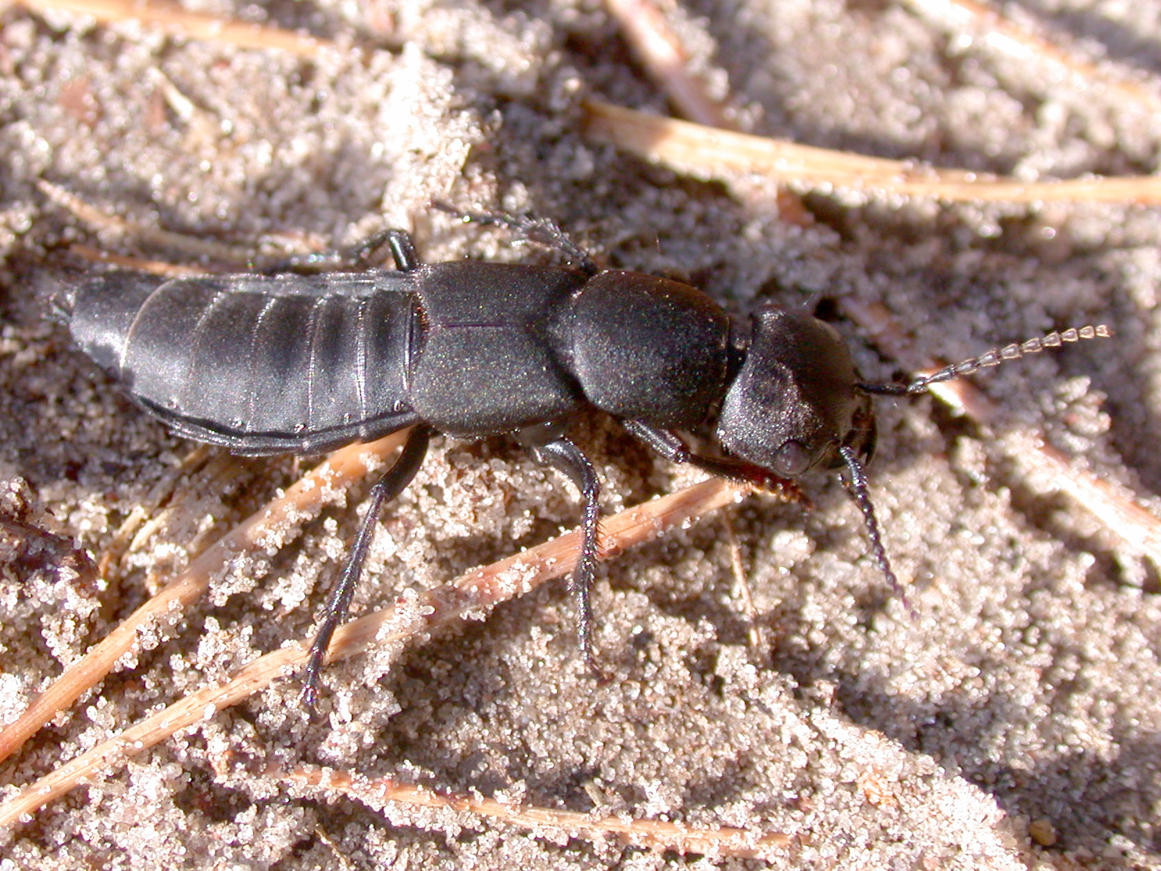 Ocypus olens